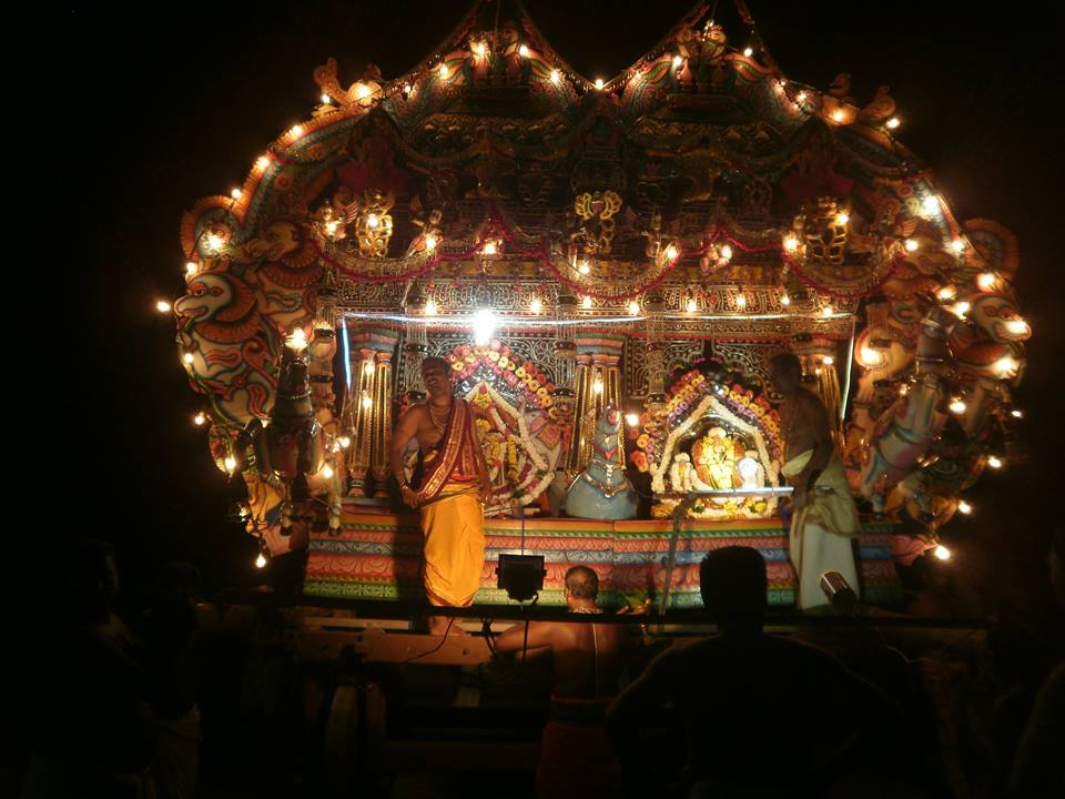 சப்பரம் 2016